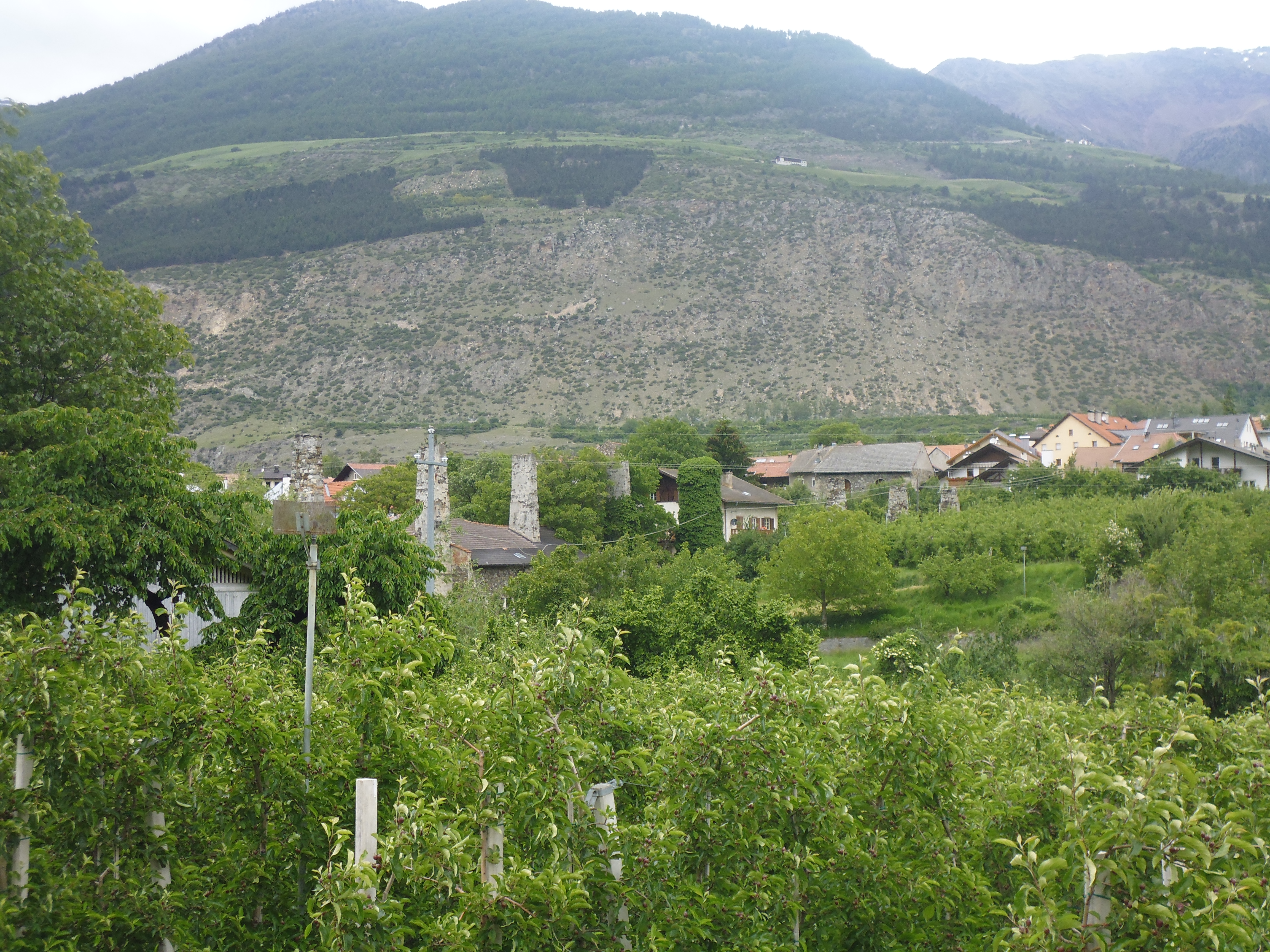 Laas